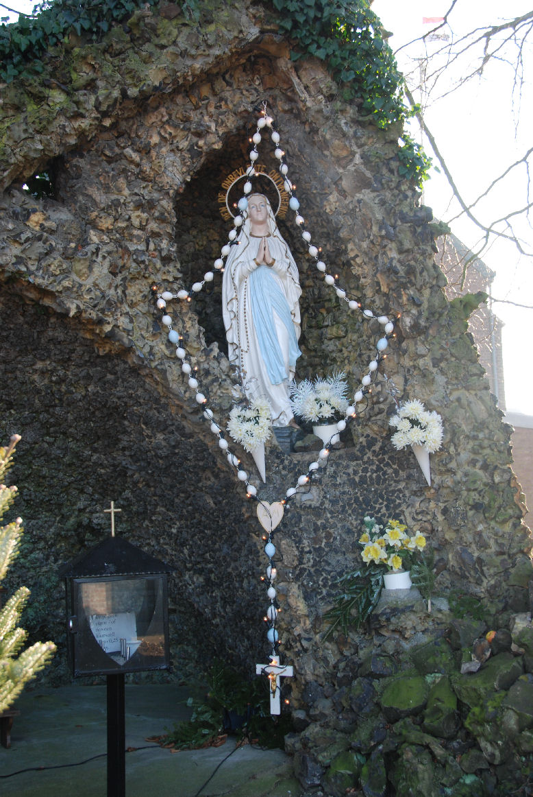 Limburgs: Tebannet (Banholt): Lourdesgrot mèt Mariabeeld en roazekrans